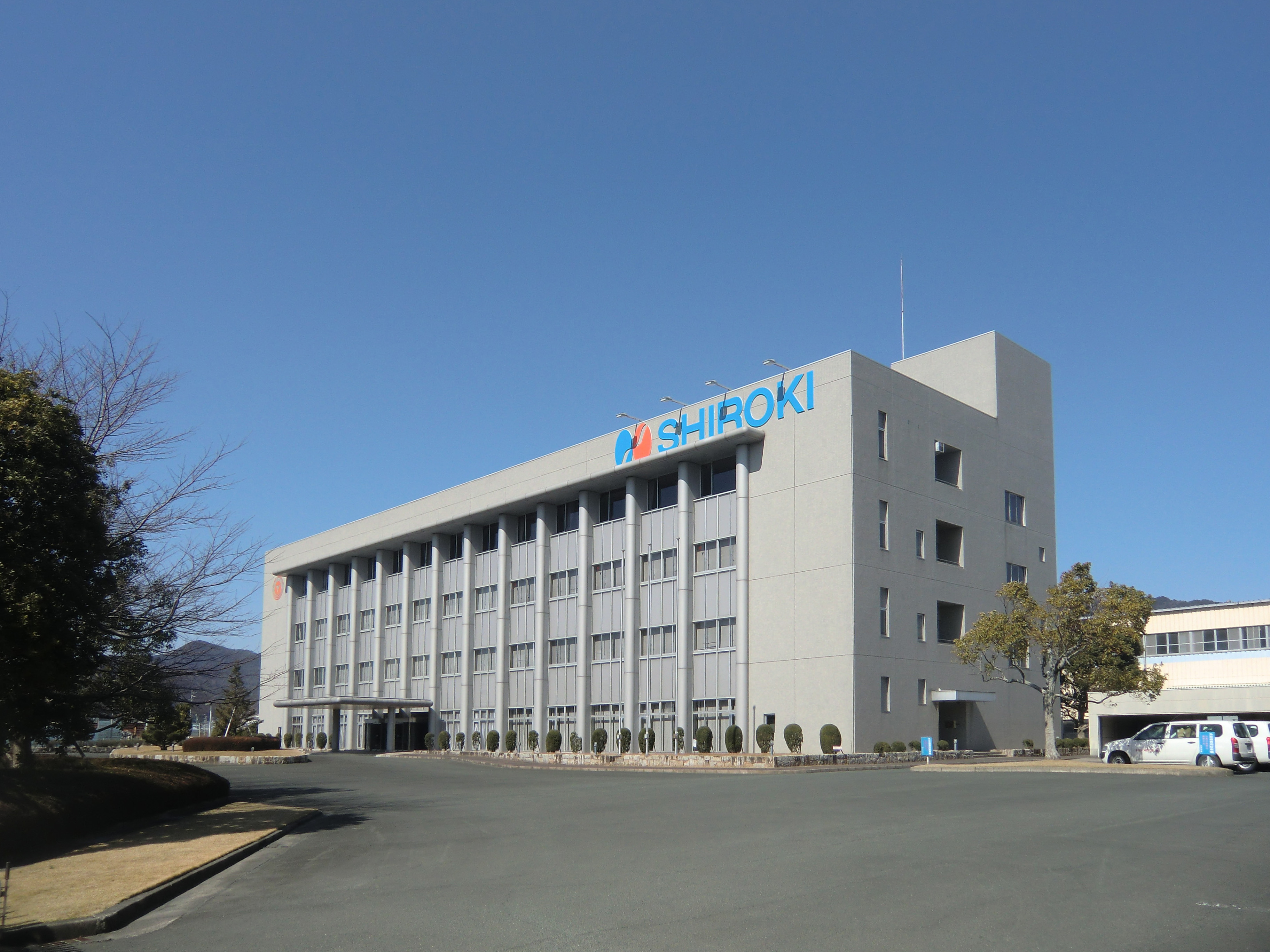 シロキ工業本社。愛知県豊川市千両町